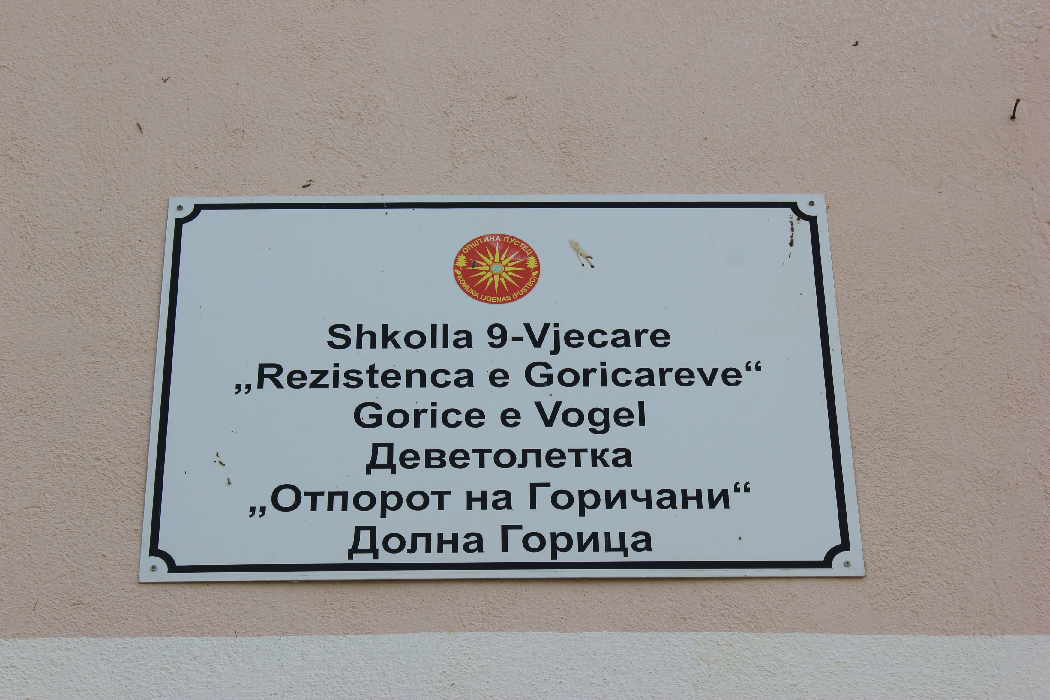 Zweisprachig mazedonisch-albanisches Schild in Dolna Gorica (Gorica e Vogel), Gemeinde Pustec, Albanien.